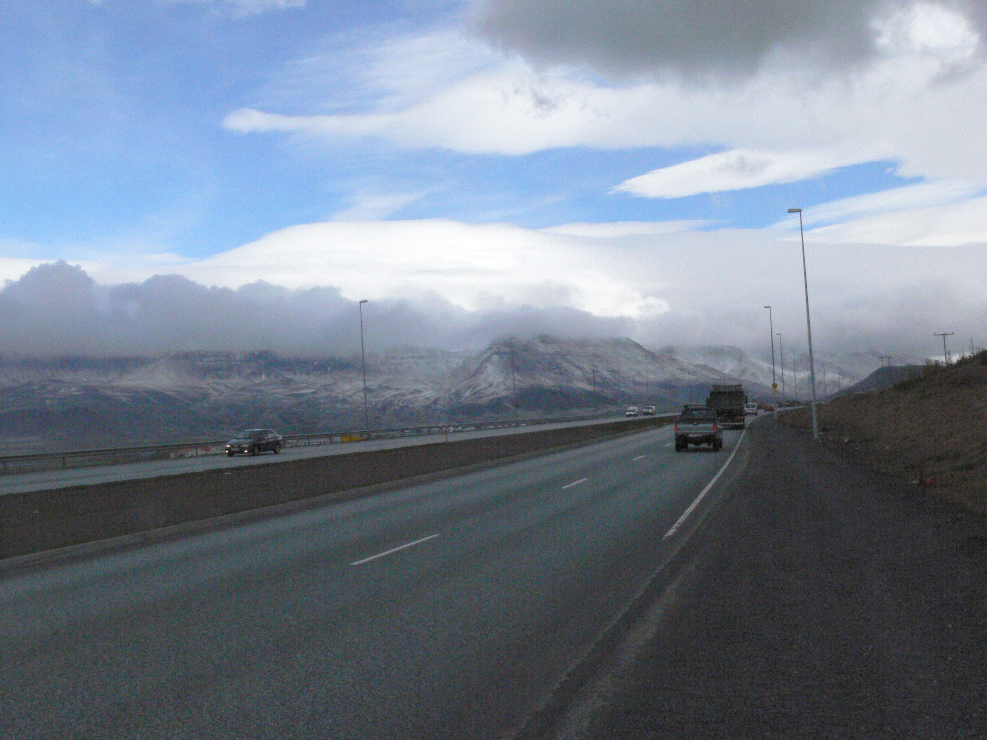 Straße von Reykjavík nach Borgarnes